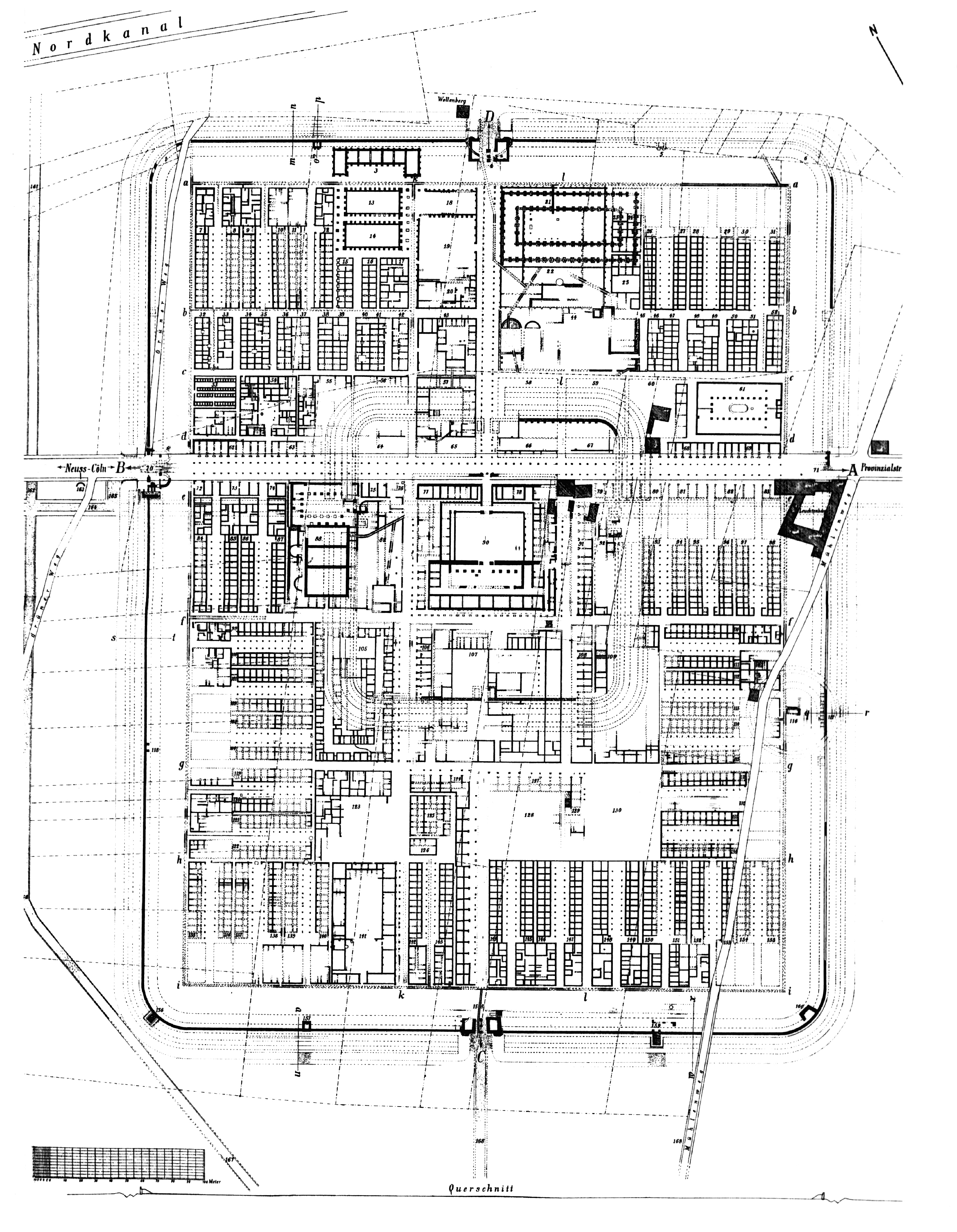 Grundriss des Legionslagers Novaesium – Grabungsbefunde des „Koenenlagers“ (1887-1900)